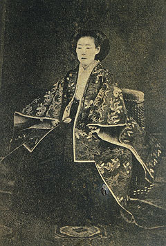 和宮親子内親王